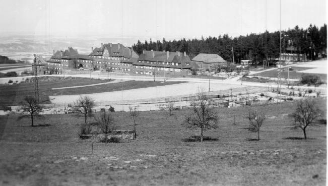 Die "Kolonie", eine Arbeitersiedlung auf dem Schneeweiderhof. Das Bild wurde etwa 1950 gemacht.